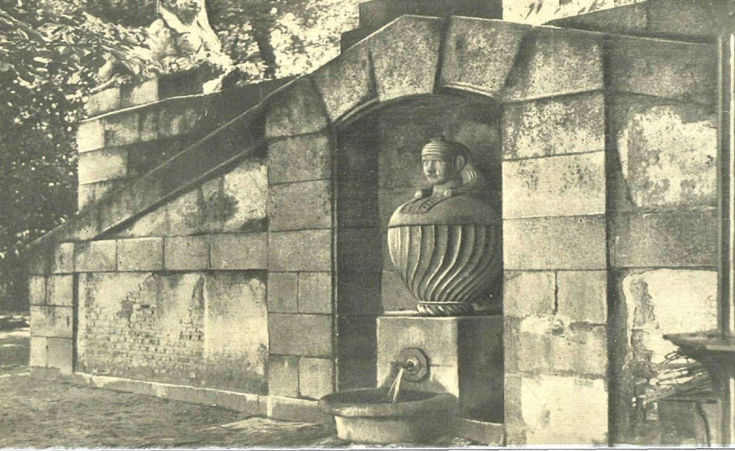 Fuente Egipcia, situada junto al Estanque Grande del Retiro. Fotografía publicada en 1922 por la revista "La Esfera", número 418, página 27. Versión digitalizada de la Biblioteca Nacional de España, Madrid. La fuente fue construida en 1850 a partir de un diseño de 1819 del arquitecto Isidro González Velázquez.